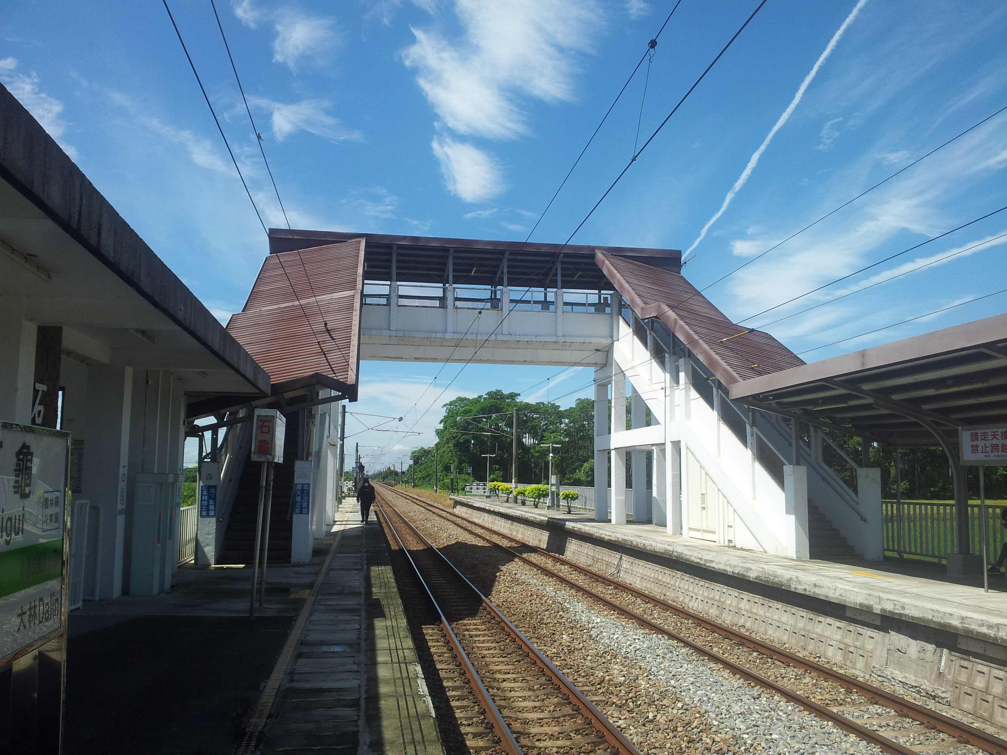 位處斗南鎮南部的石龜車站